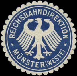 Sealing stamp Title: Reichsbahndirektion Münster Westfalen Description: Eisenbahn, dunkelblau, weiß, geprägt Place: Münster size: 5 cm